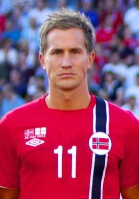 Starting lineup for Norway against England, 26 May, 2012. Front row: 15 Alexander Tettey, 10 Tarik Elyounoussi, 2 Tom Hogli, 1 Rune Jartsein, 6 John Arne Riise Back row: 4 Vadim Demidov, 11 Morten Gamst Pedersen, 7 Markus Henriksen, 21 Daniel Braaten, 9 Mohammed Abdellaoue, 5 Brede Hangeland